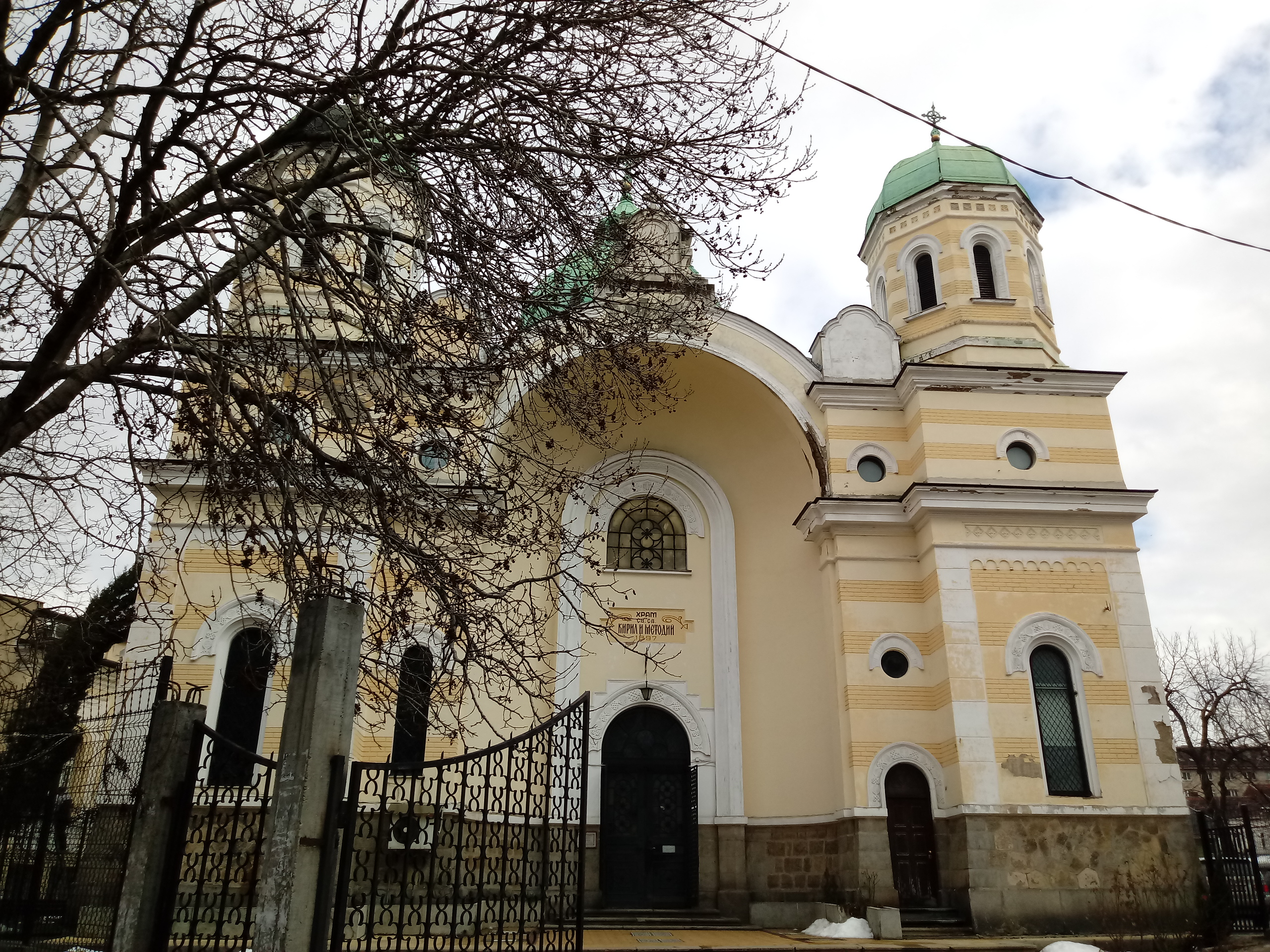 Cyril and Methodius church, Sofia